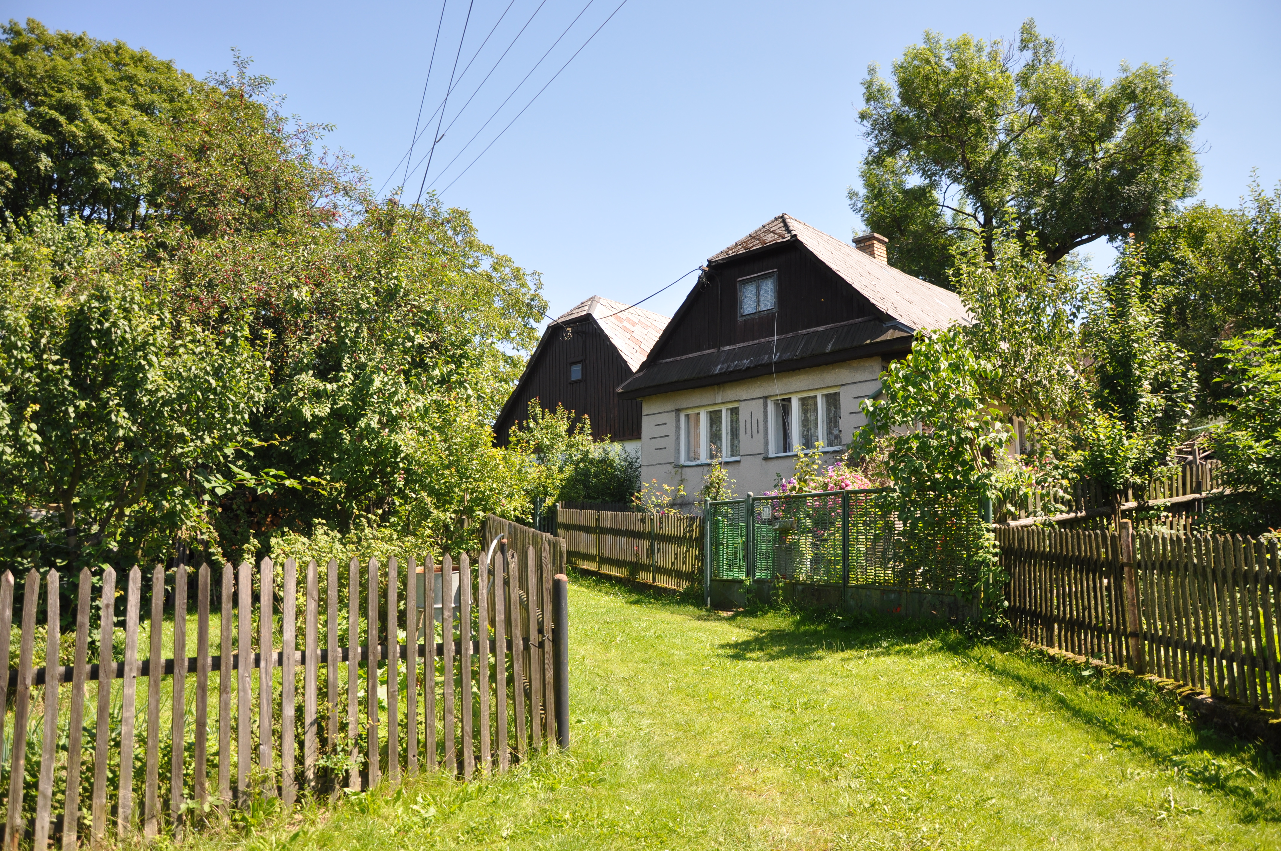 Modletín (Rušinov, okres Havlíčkův Brod)